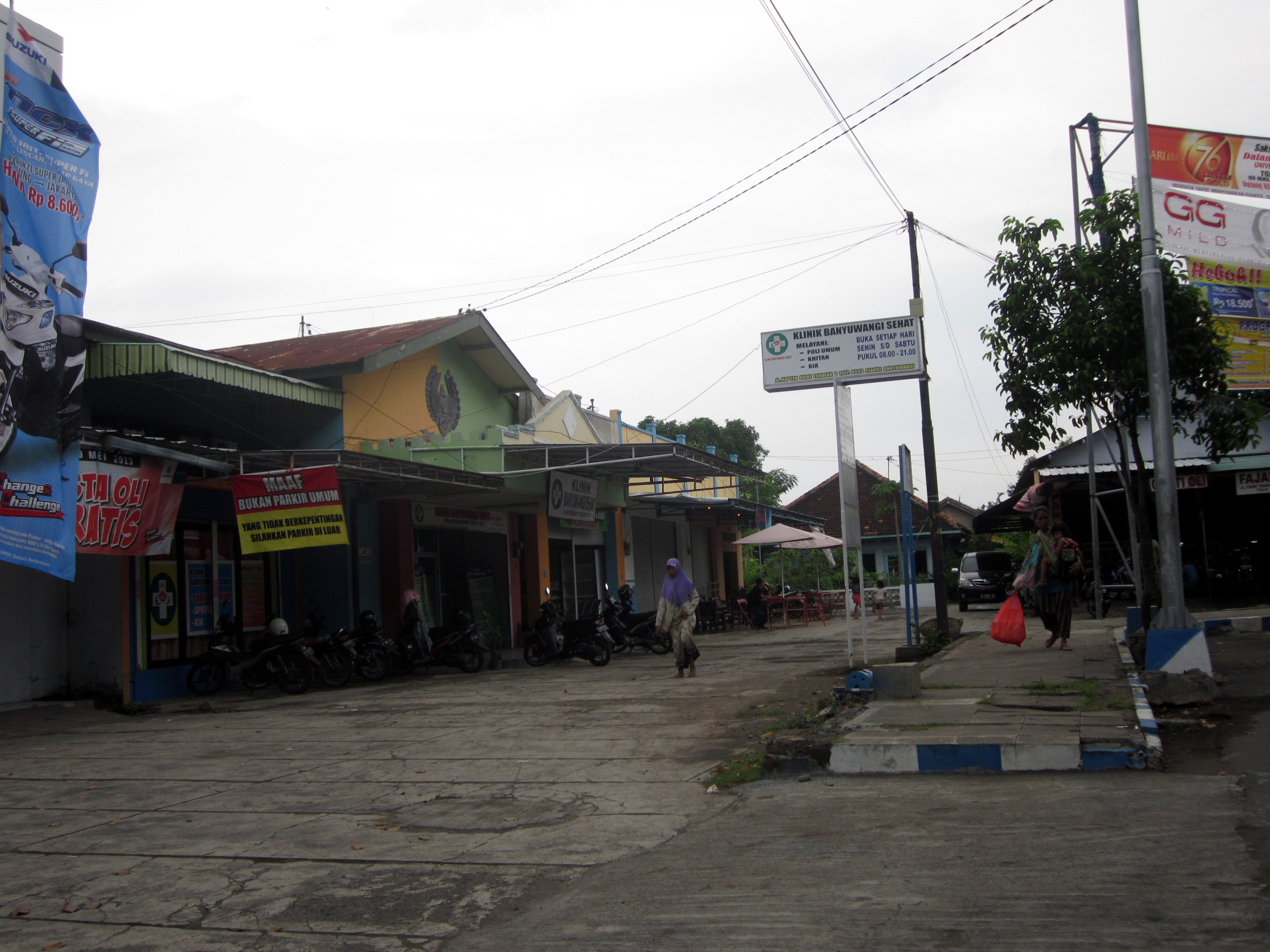 Stasiun Banyuwangi yang kini menjadi kawasan pertokoan